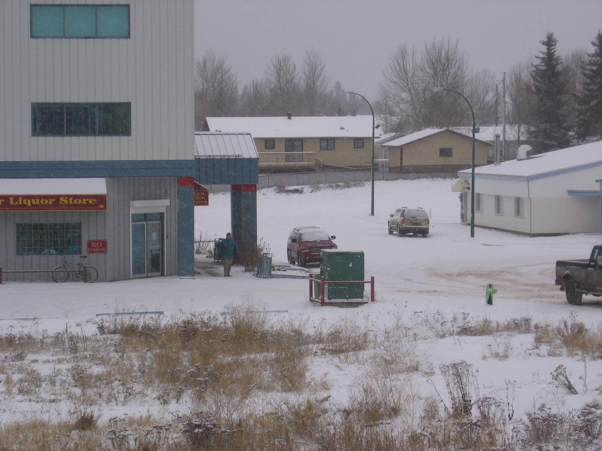 View from my window